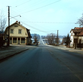 Drottningholmsvägen vid hörnet av Grönviksvägen i Nockeby, Bromma, Västerort i Stockholm. Kvartret Isbjörnen och kvarteret Ordensbrodern.